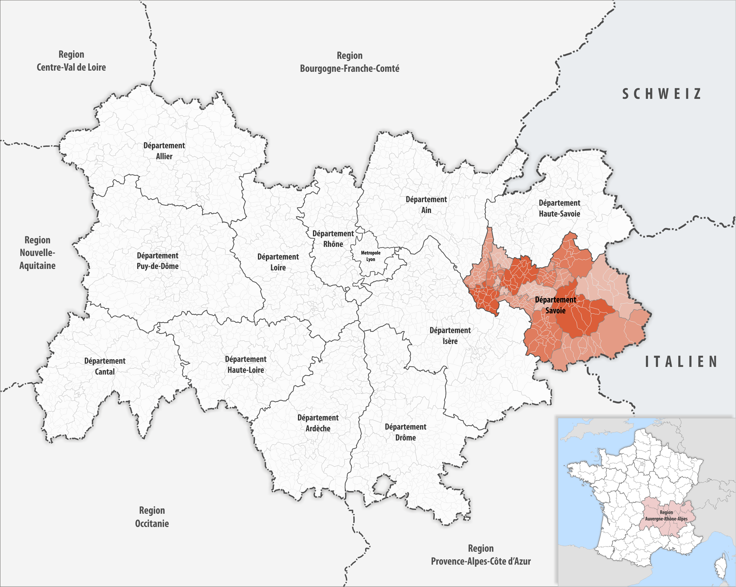 Lage des Departements Savoie